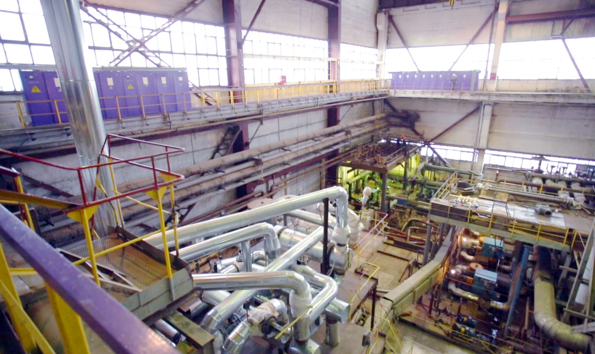 В главном турбинном зале НиГРЭС